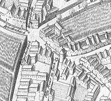 Ausschnitt des Mercator – Stadtplanes Köln. Bereich „Griechenpforte”, mit ergänzenden, heutigen Straßenbezeichnungen